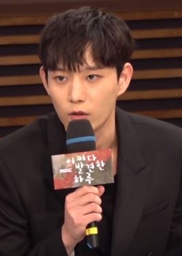 MBC 새 수목드라마 '어쩌다 발견한 하루'는 상큼한 비주얼과 다정한 성격, 겉으로 보기에는 모자랄 것 없이 풍족해 보이는 엄친딸 여고생 은단오(김혜윤)가 정해진 운명을 거스르고 사랑을 이뤄내는 본격 학원 로맨스를 다룬 작품입니다.